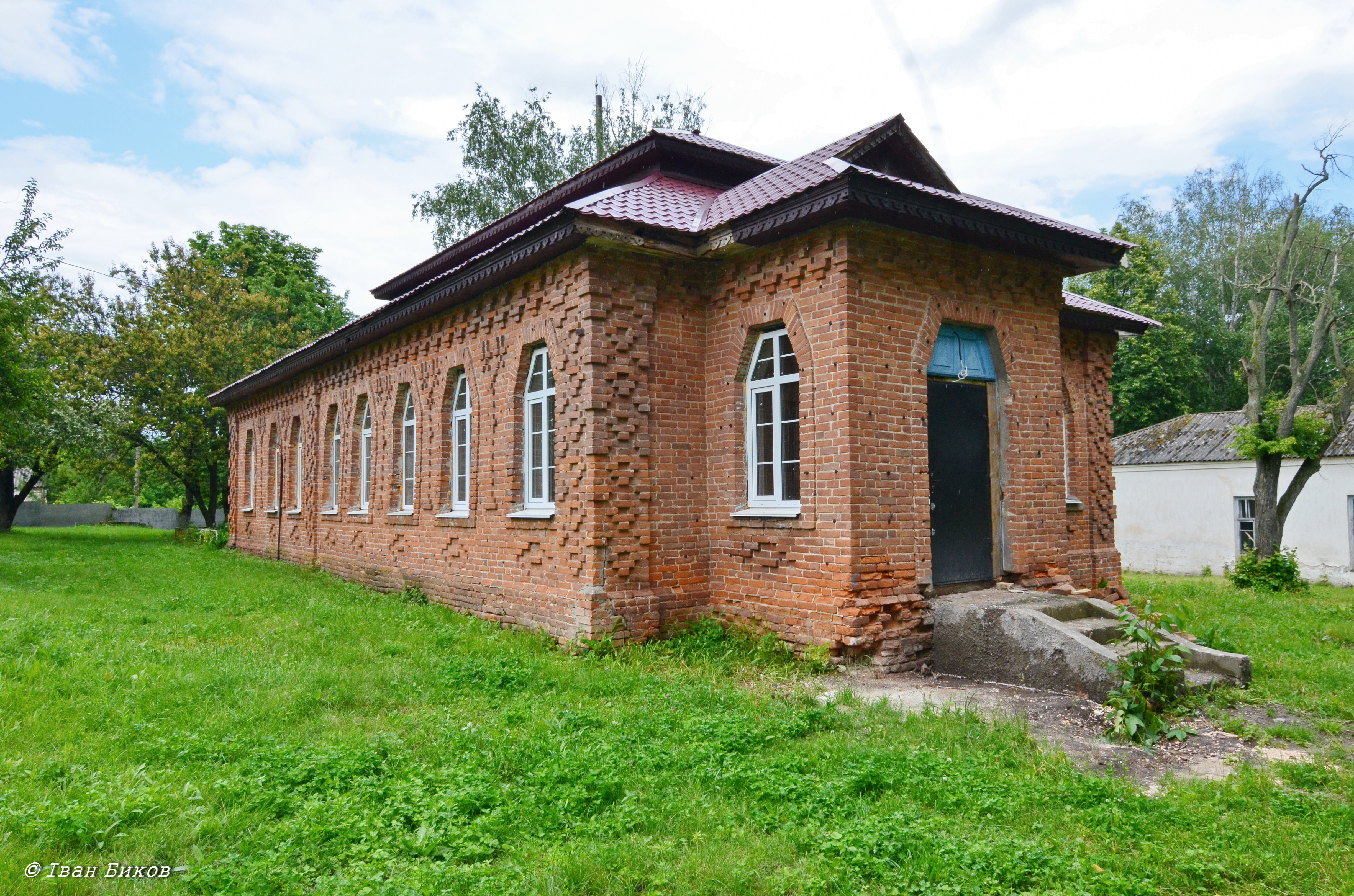 Дуже цінна, рідкісна будівля в стилі українського модерну. Збудована за проектом Опанаса Сластіона. Прикрашена вишуканим цегляним декором за мотивами українських народних орнаментів. Будівля спаплюжена неякісним ремонтом 2016 року.